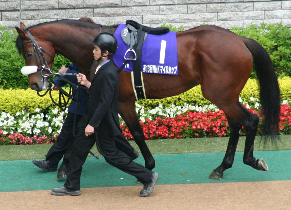 サトノプログレス（東京競馬場）